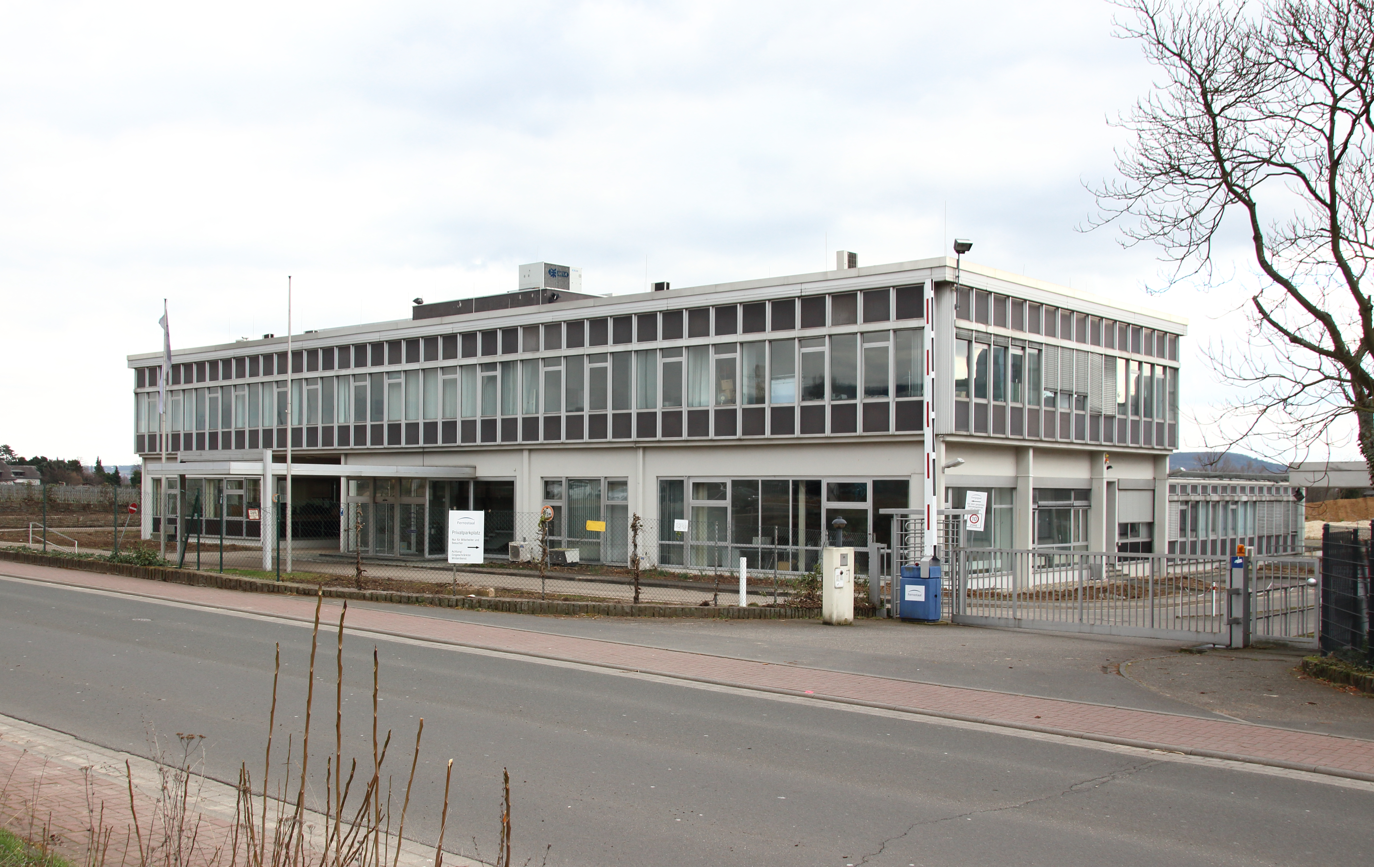 Ehemaliges Verwaltungsgebäude der Fritz Werner Industrie-Ausrüstungen GmbH, später MAN Ferrostaal. Erbaut 1966/67, Abriss in 2020. Industriestraße 7, Geisenheim